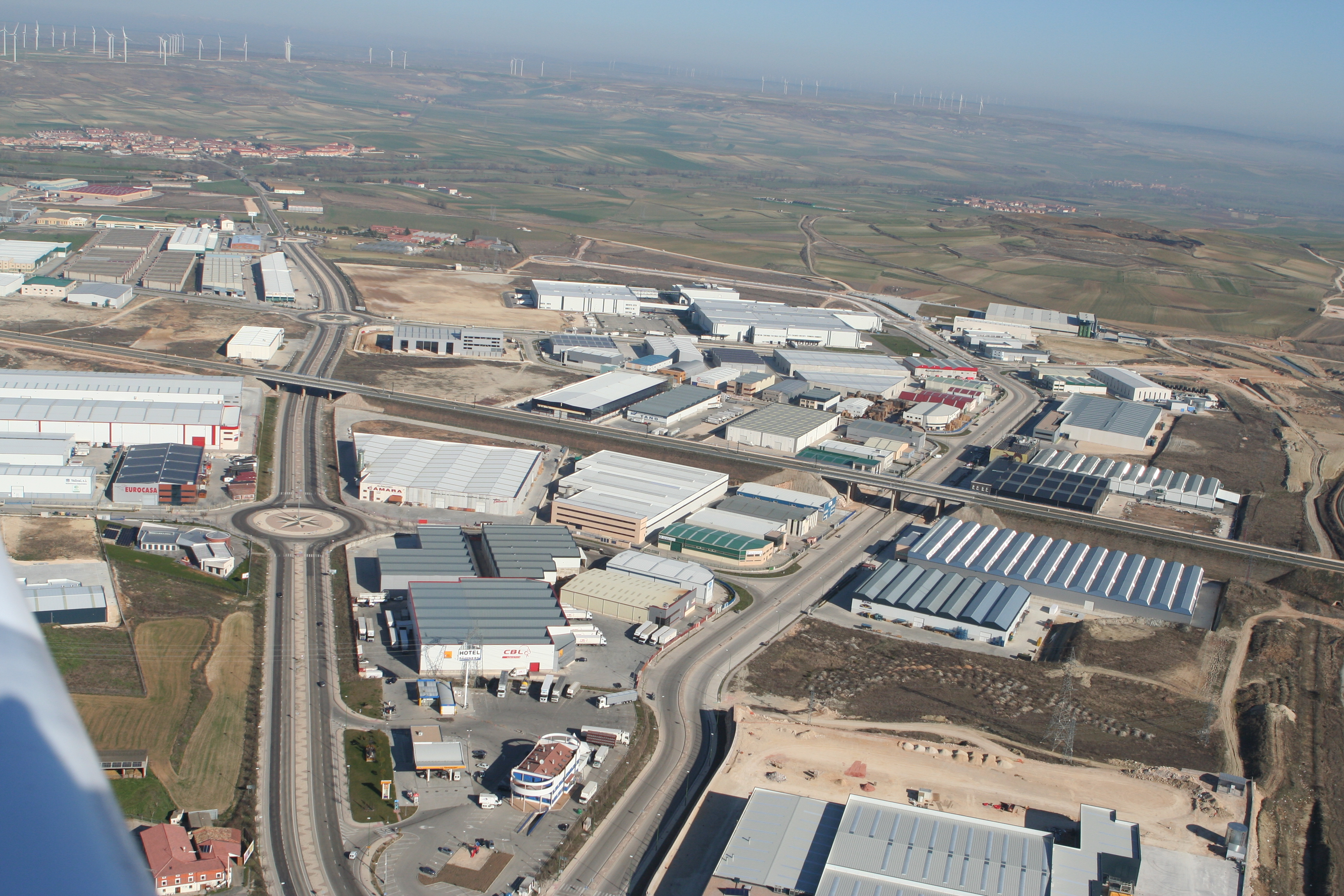 Vista aérea de la parte este del polígono burgalés de Villalonquéjar.